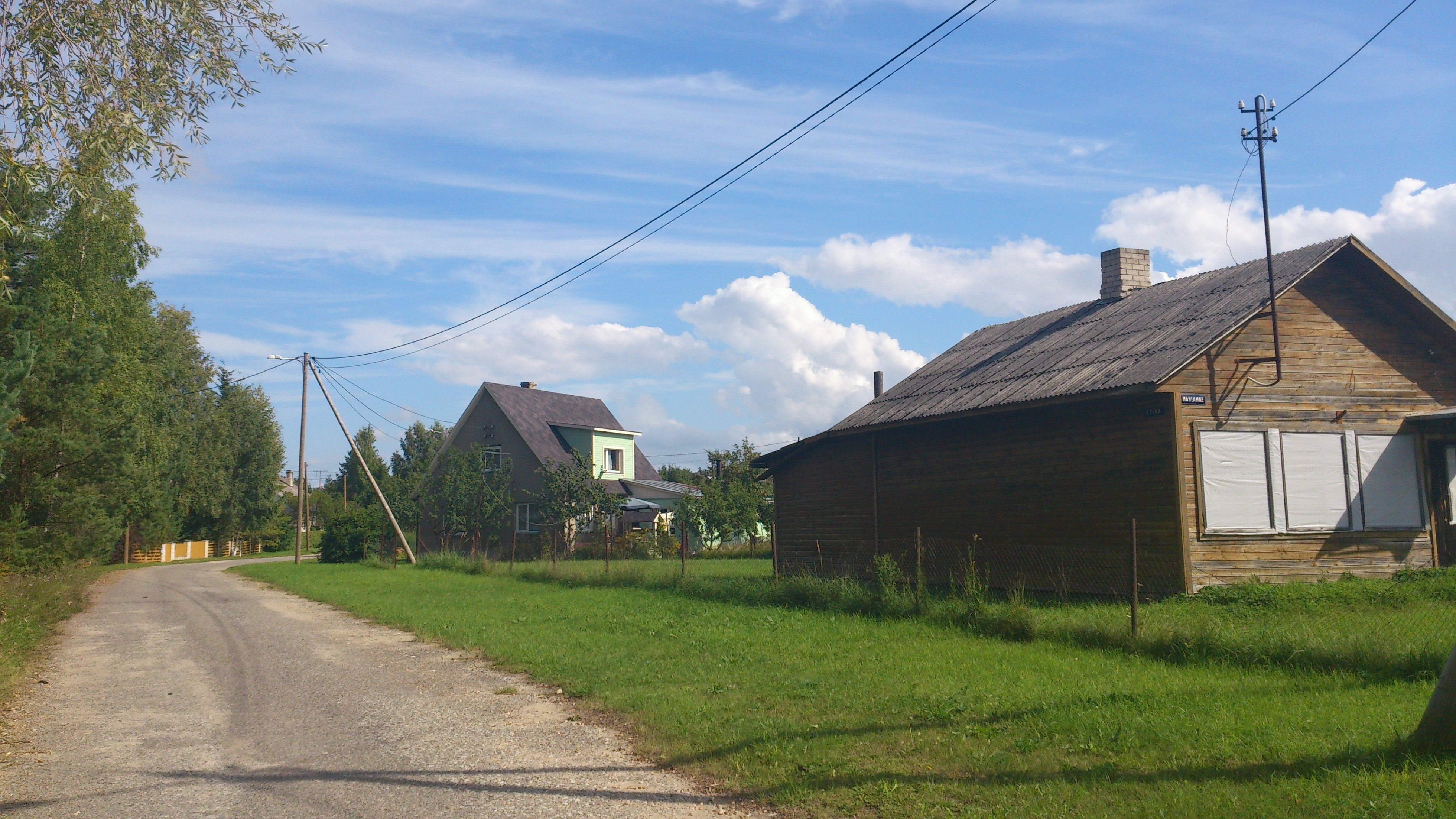 Mahlamäe ja Heina tänava nurk Mahlamäe elurajoonis Elvas, 31. august 2013.